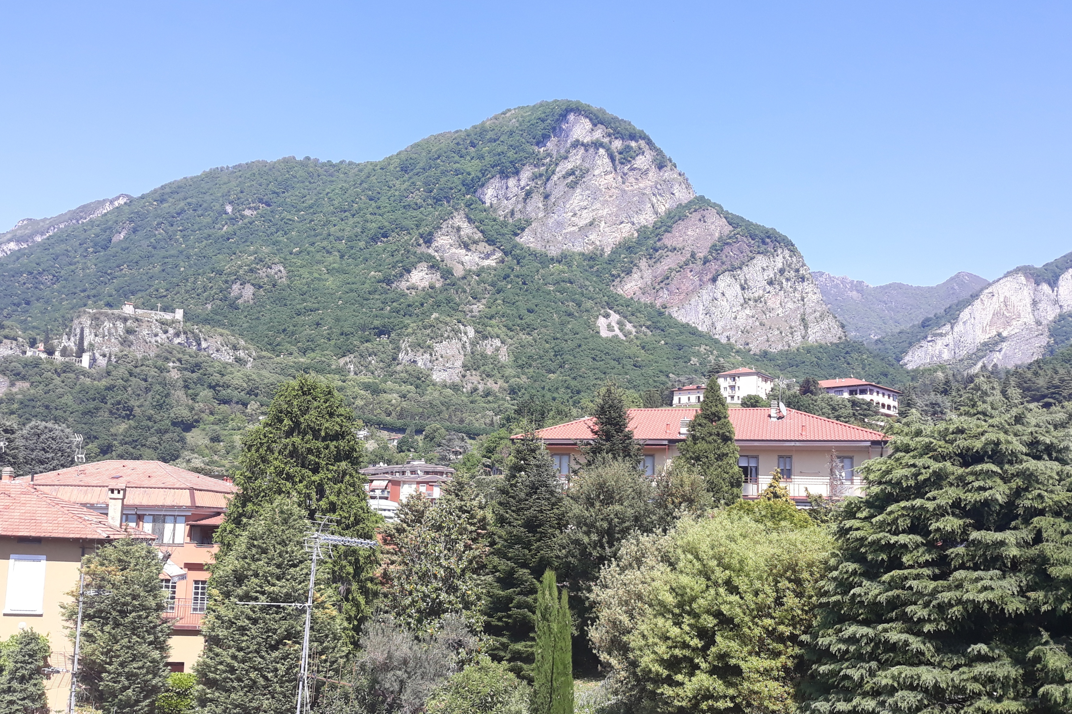 Vista del Monte Mudarga da Vercurago